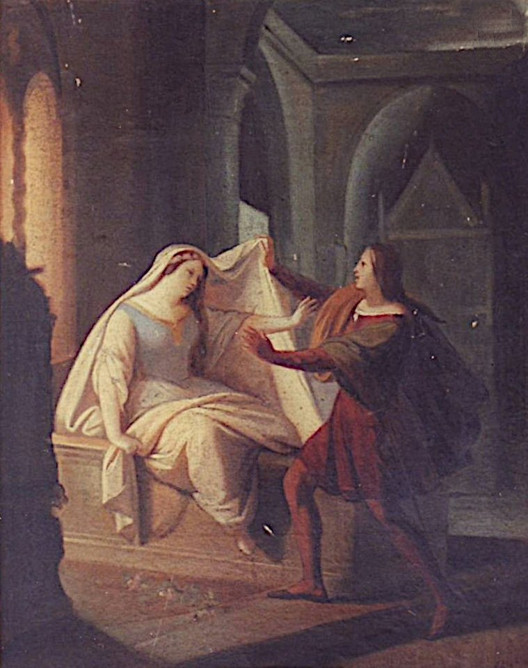 Scenă din Romeo și Julieta, ulei/carton, 0,47x0,17m - Muzeul Gheorghe Tattarescu